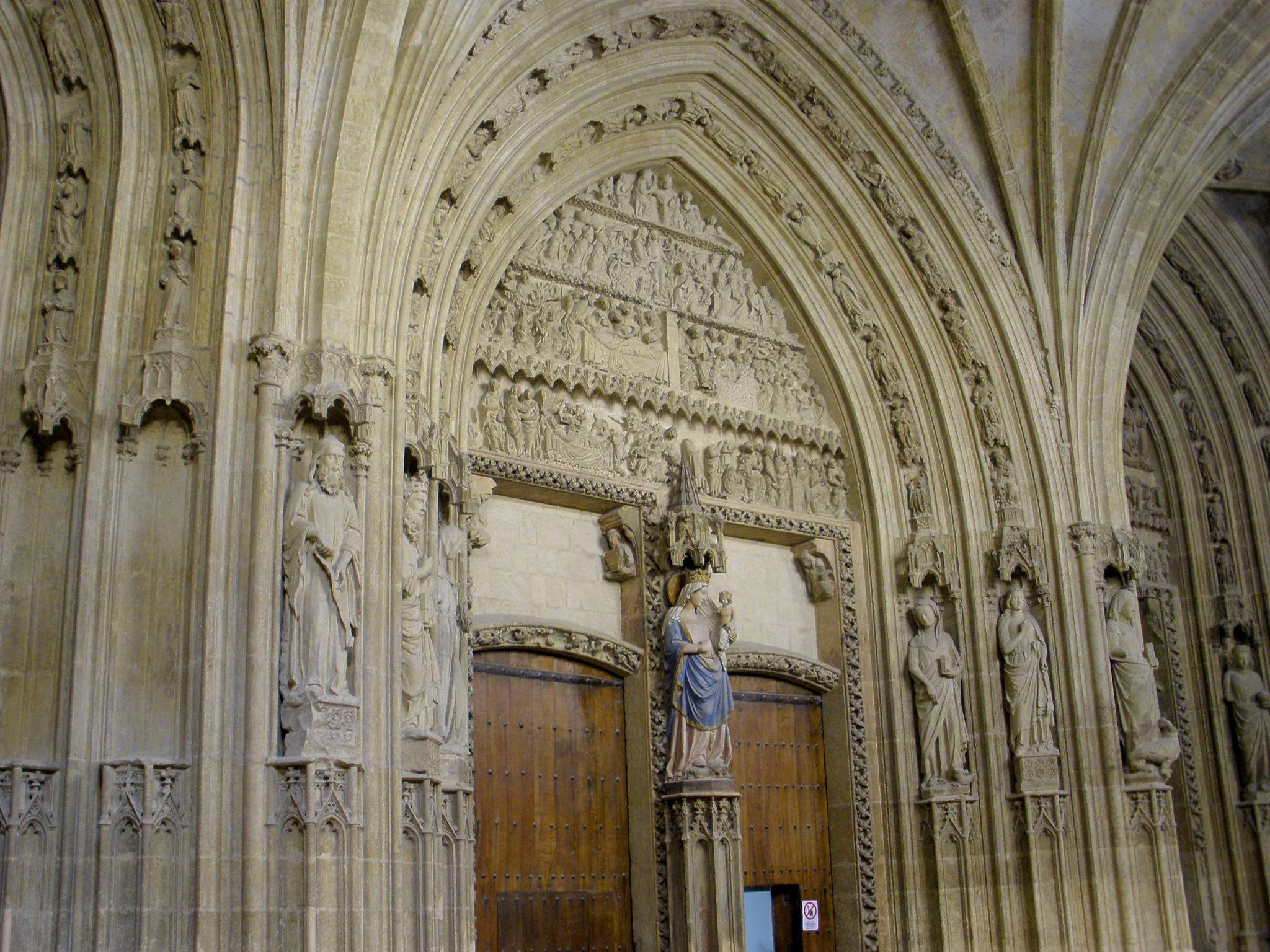 Pórtico de la Catedral de Santa María (Catedral Vieja) de Vitoria-Gasteiz